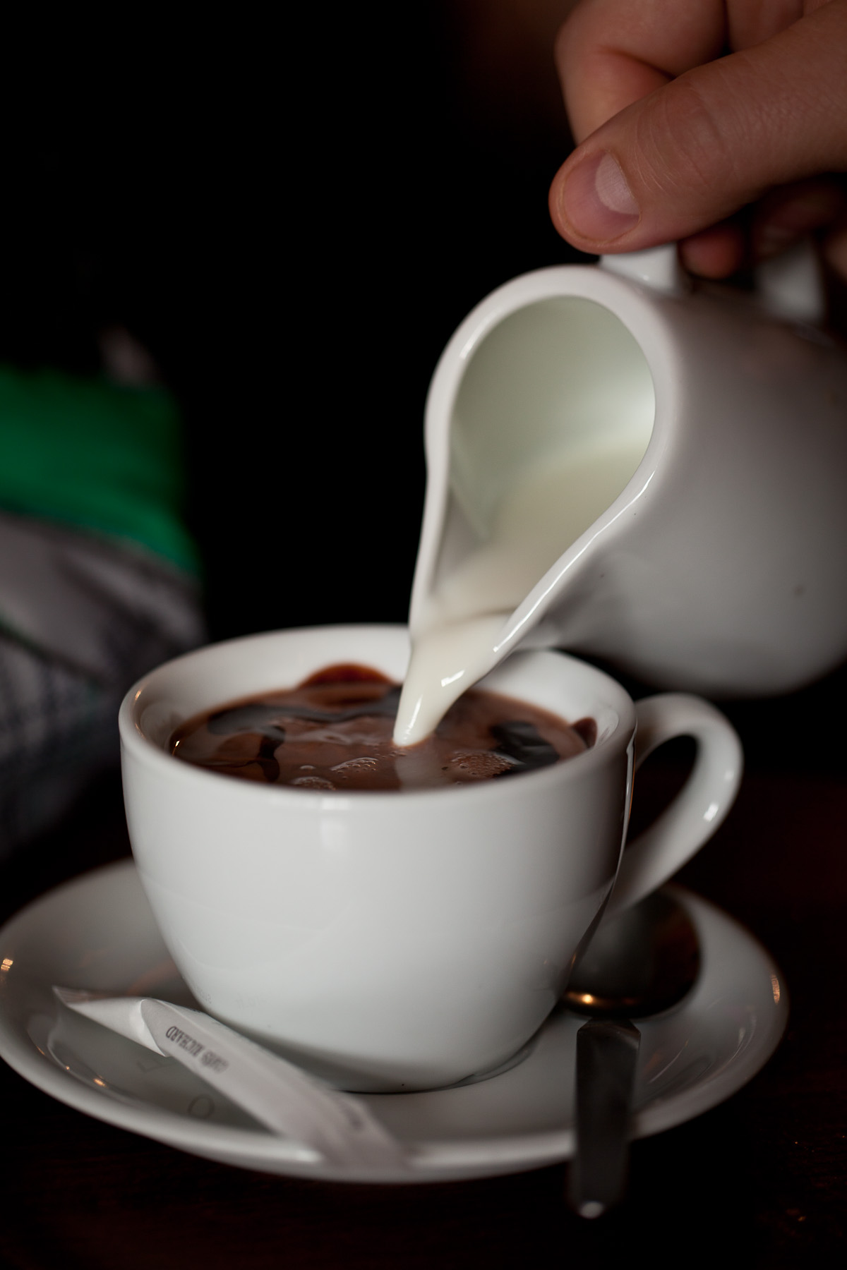 Paris